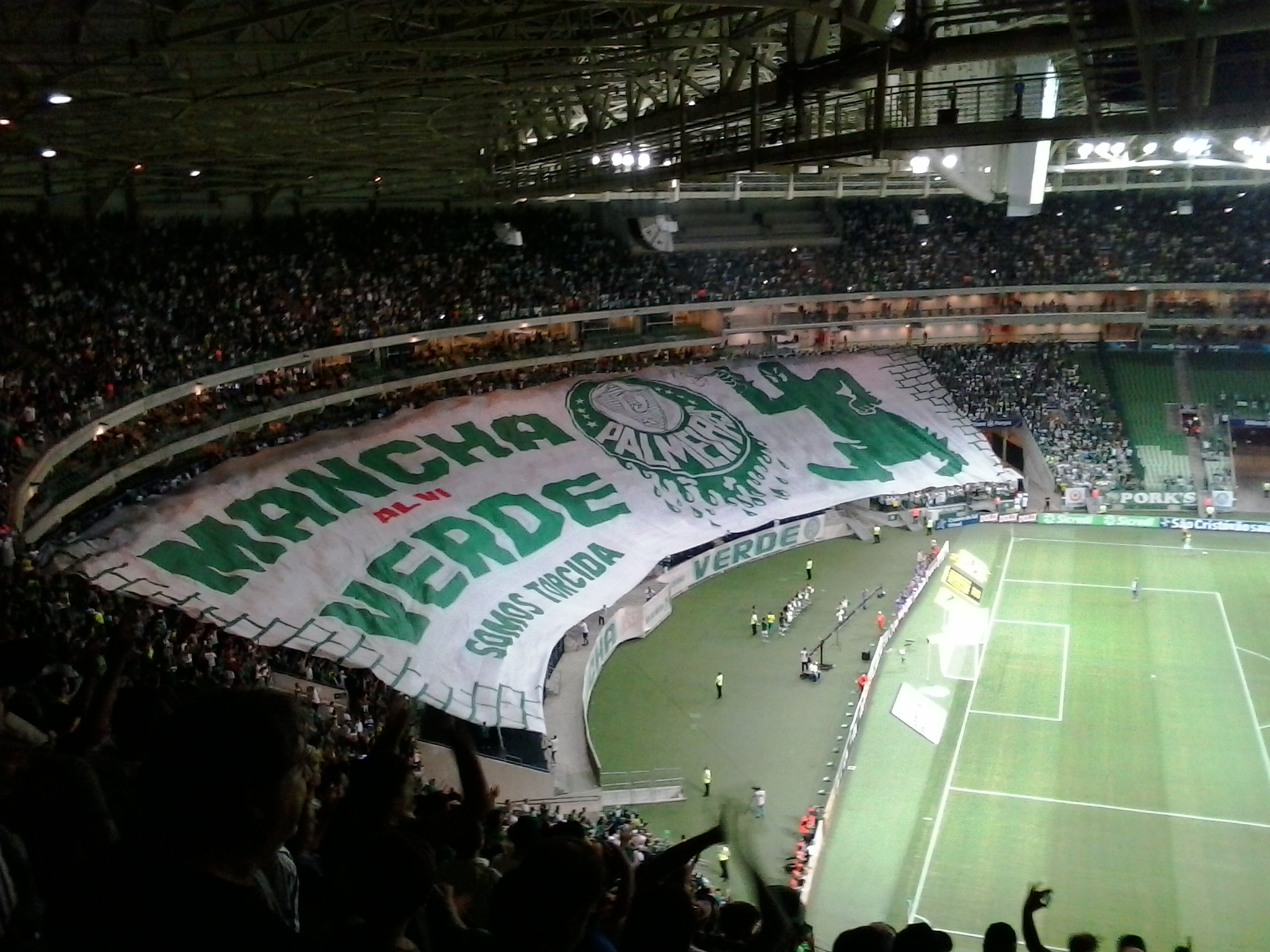 Bandeirão da torcida Mancha Alviverde durante partida do Palmeiras no Allianz Parque em 2018.